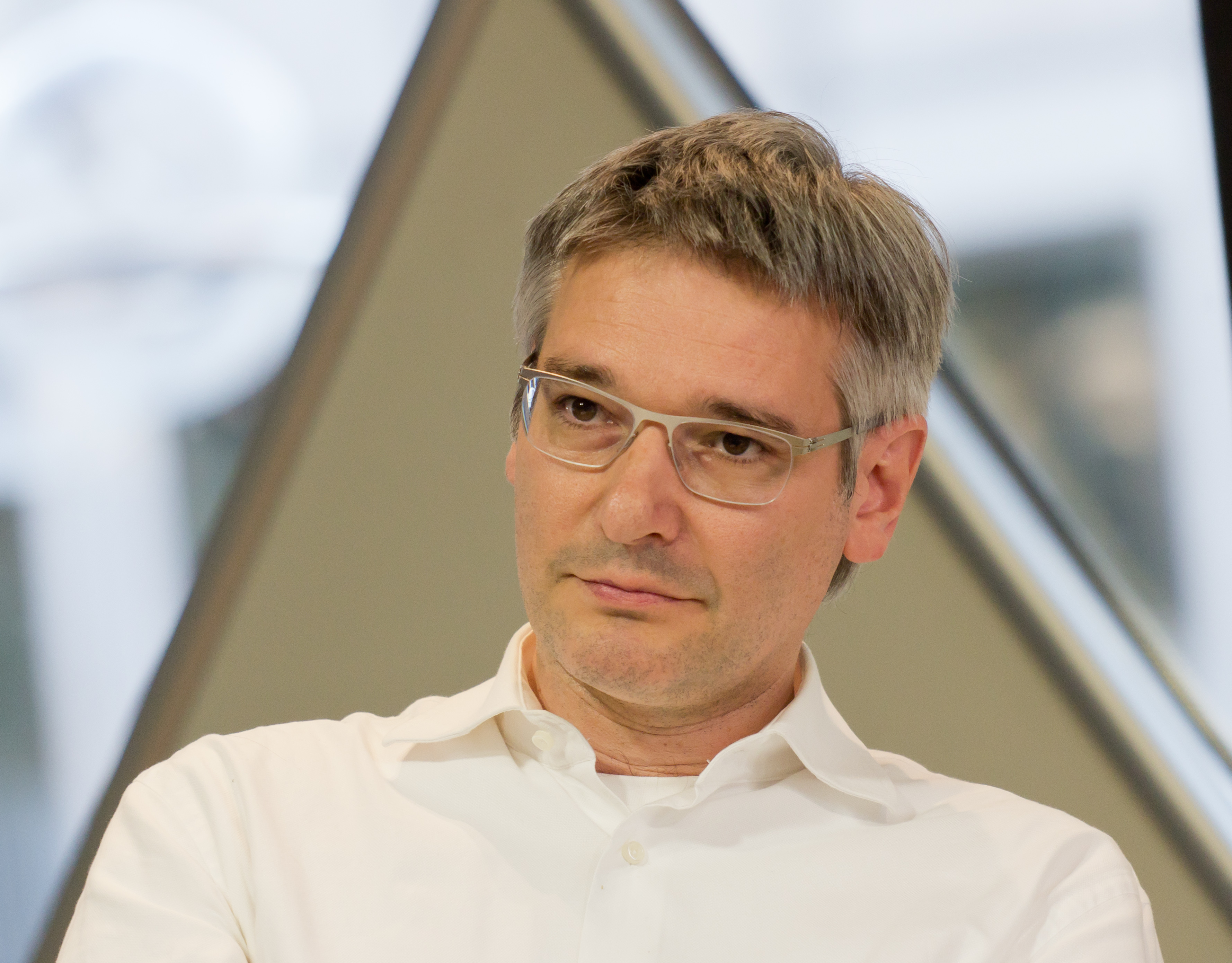 Thomas Werner, Leiter des Amtes für Denkmalpflege, Köln, während einer Podiumsdiskussion im Domforum, Juni 2013